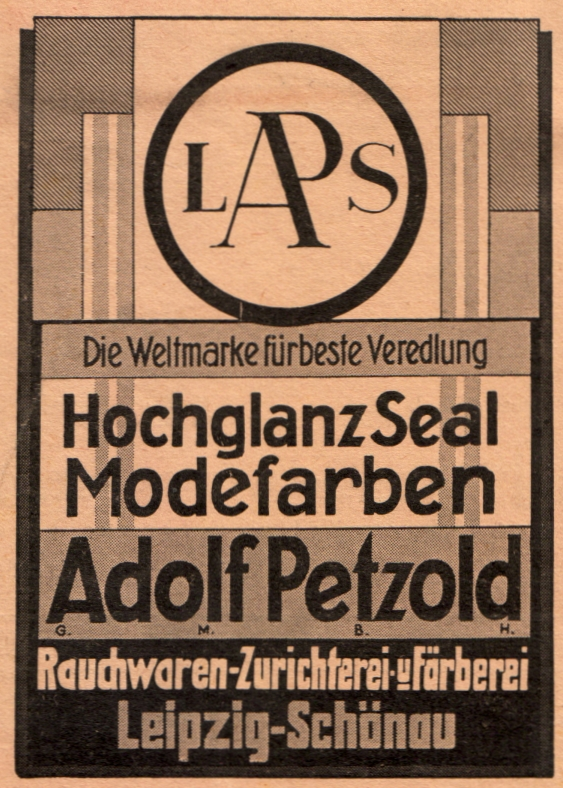 Anzeige des Rauchwaren-Zurichters und Färbers Adolf Petzold, Leipzig-Schönau von der Rückseite einer Kürschner-Fachzeitschrift aus 1943, dem vorletzten Kriegsjahr des 2. Weltkriegs LAPS - Die Weltmarke für beste Veredlung. Hochglanz Seal. Modefarben. Rauchwaren-Zurichterei- u. Färberei Aus Kürschner-Zeitung. Mit den amtlichen Bekanntmachungen des Reichsinnungs-Verbandes Verlag Alexander Duncker, Leipzig C.1, Keilstraße 1 Ältestes Fachblatt für die deutsche Pelzwirtschaft Verantwortlich Otto Wilhelm, Leipzig 60. Jahrgang, Heft Nr. 3-4 23. Januar 1976: Konkursantrag nach hohen Schadensersatzforderungen und Vertrauensverlust der Kundschaft. 20. Februar 1976: Das Bemühen um das Fortbestehen der Firma durch Alfred Petzold sowie der Herren Hansen und Mann und des Konkursverwalters waren erfolglos, die Belegschaft wird gekündigt und Einrichtung und Maschinen zum Verkauf angeboten.Quelle: Winckelmann Pelzmarkt, Messeausgabe 1976.